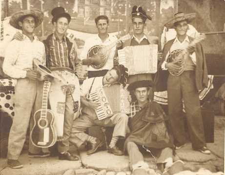 La Función en Villafranca de la Sierra (mediados de los 50). (Ávila, España). Autor: Desconocido (álbum familiar de C3PO)